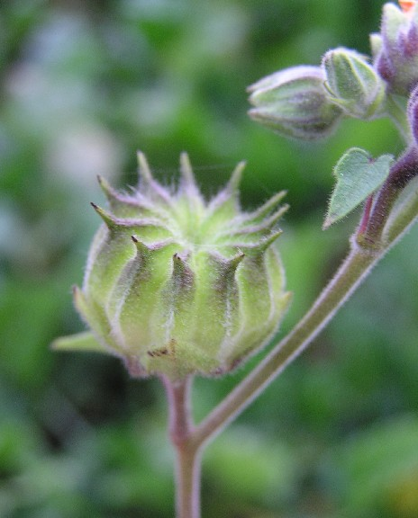 Unreife Frucht von Abutilon theophrasti auf einem Rübenacker bei Neuss.